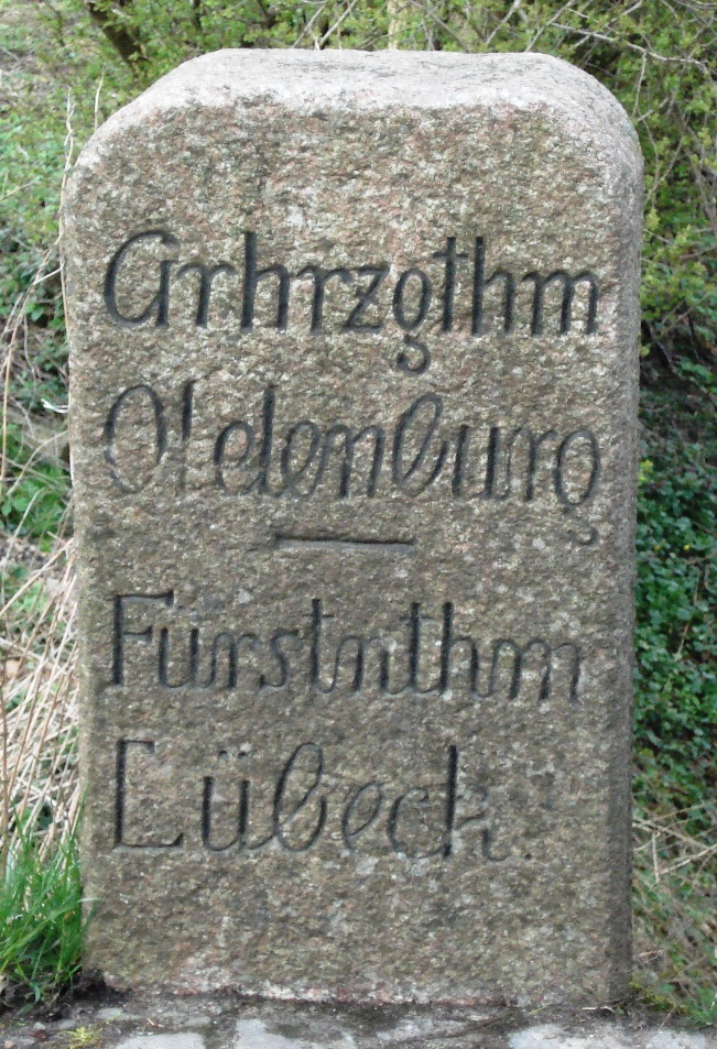 Der Grenzstein des Fuerstentums Luebeck bei Hassendorf.